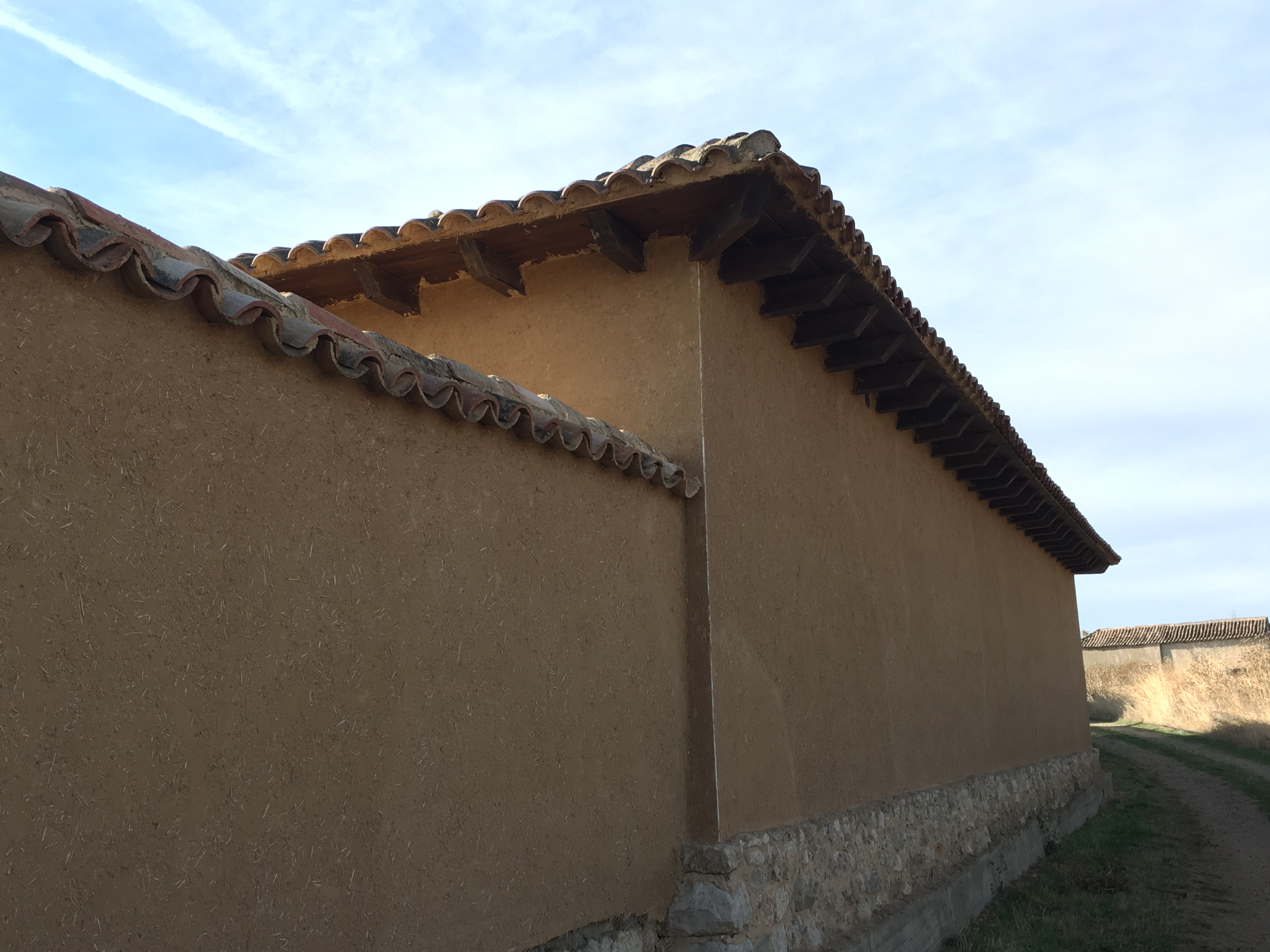 Villaesper Milenario